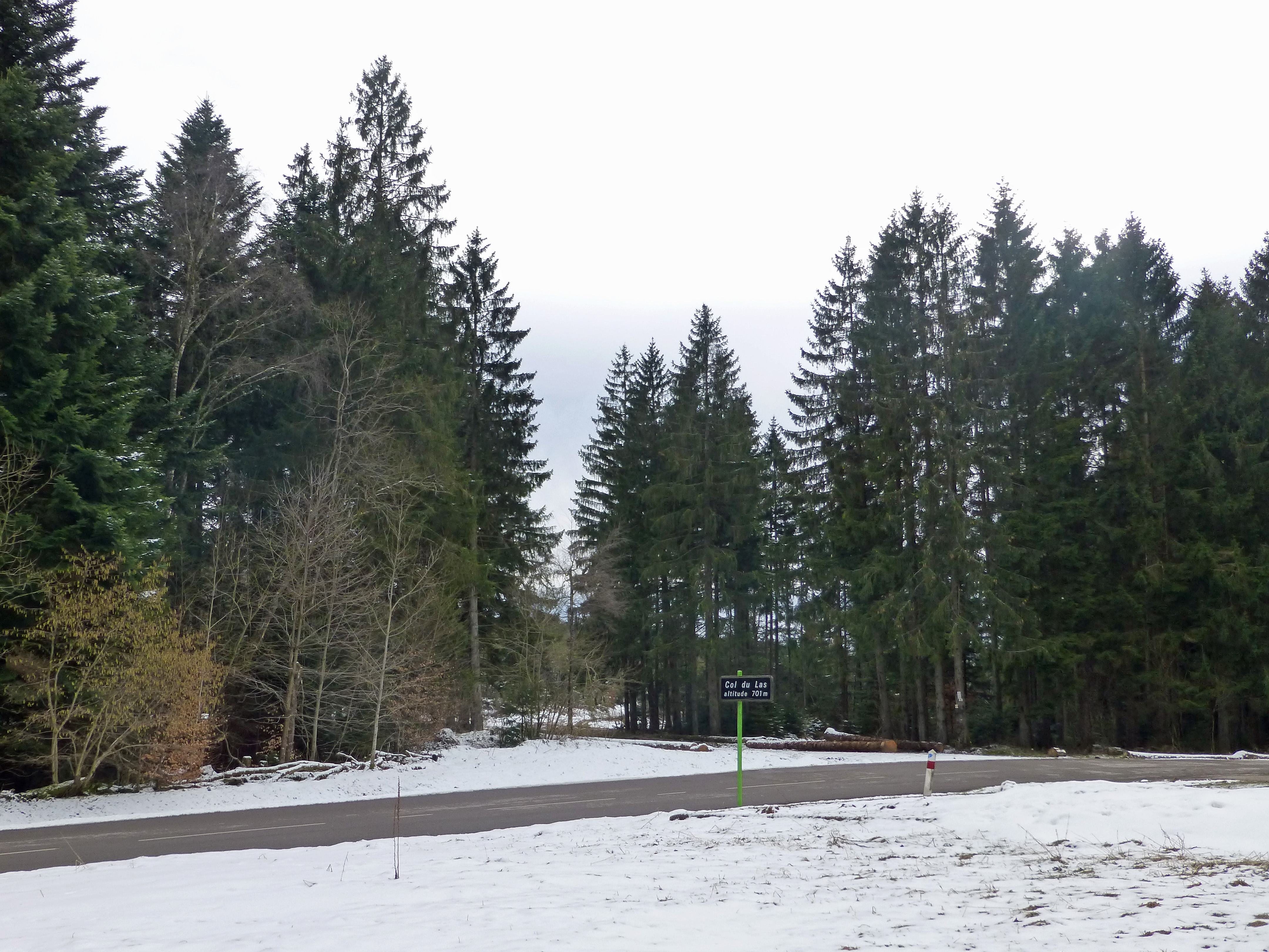 Col du Las (Vosges) en hiver